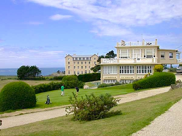 le club house au golf